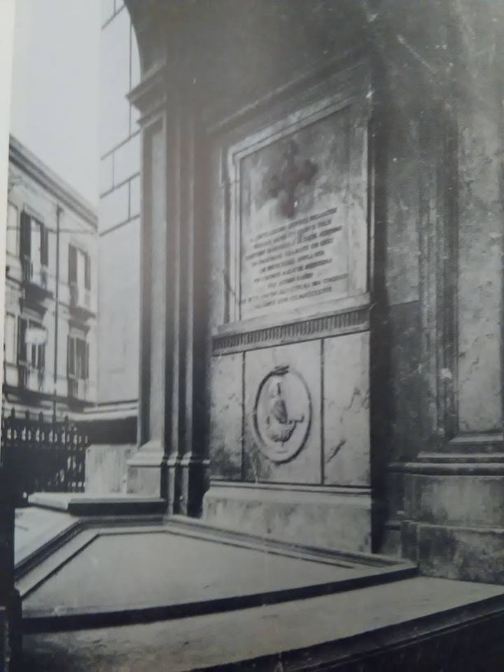 Napoli, Fuorigrotta - Vecchia chiesa di San Vitale (distrutta nel 1939) : tomba di Leopardi nel suo ingresso. Autore sconosciuto.